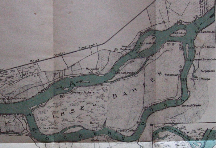 Väina jõe saared XIX–XXsajandi vahetusel väljaantud kaardil.